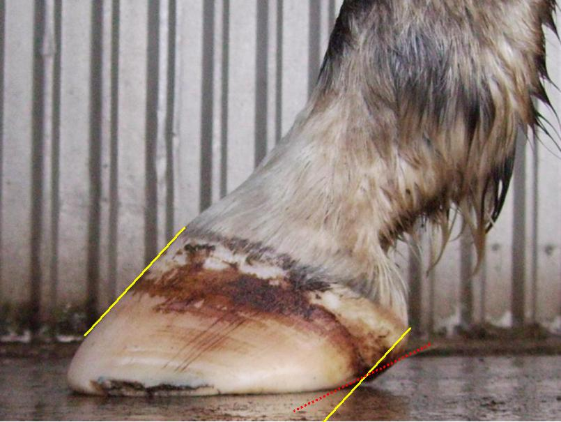 untergeschobene Trachten. Die Hornröhrchen des Hufes sollten alle parallel zueinander sein, wenn man den Huf von der Seite betrachtet. Hier ist aber deutlich eine Abweichung (rote Linie) vom zu der Zehe passenden Verlauf (gelbe Linie) zu sehen.